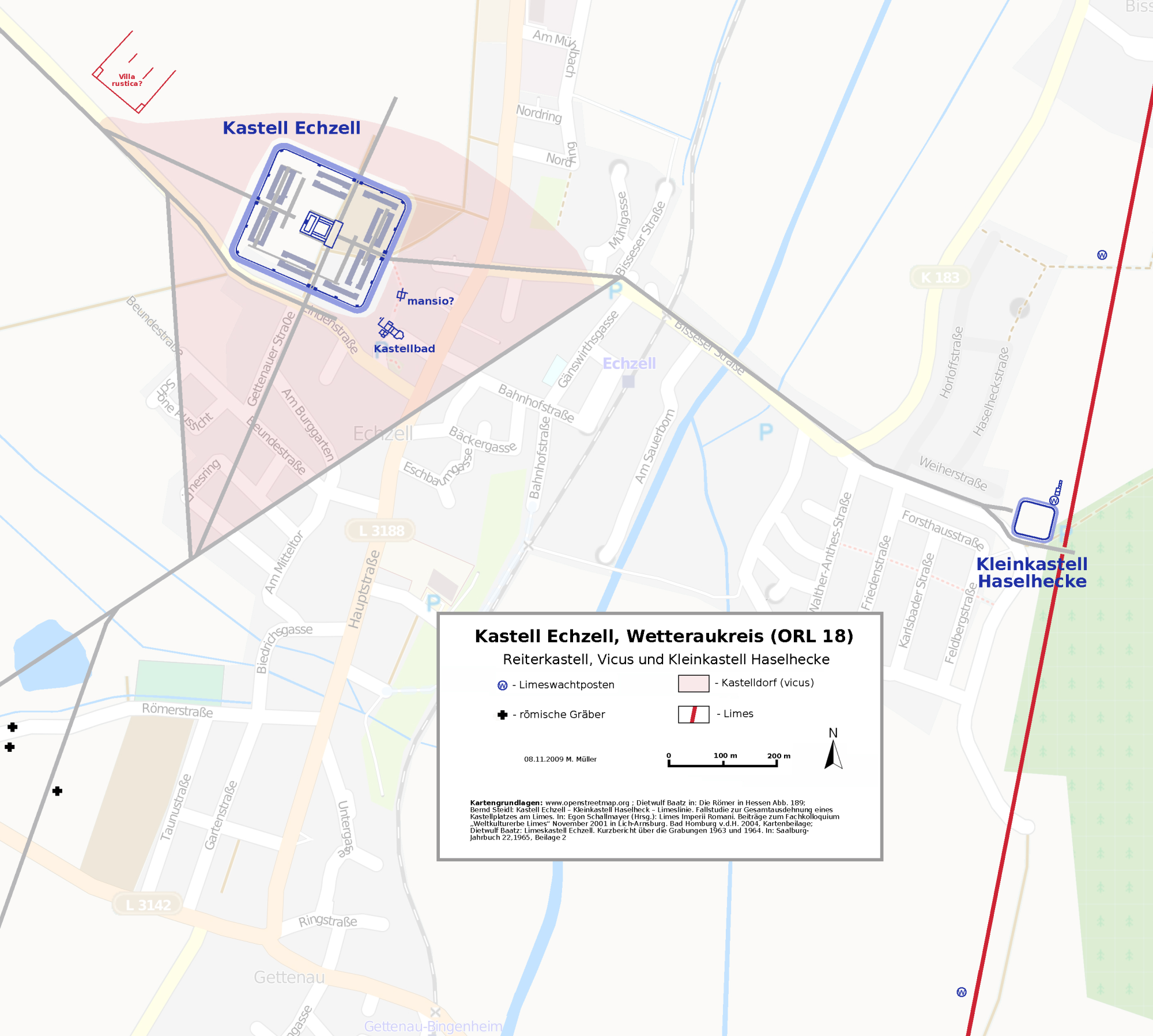 Lageplan des Kastell Echzell (ORL 18), Wetteraukreis, Hessen.